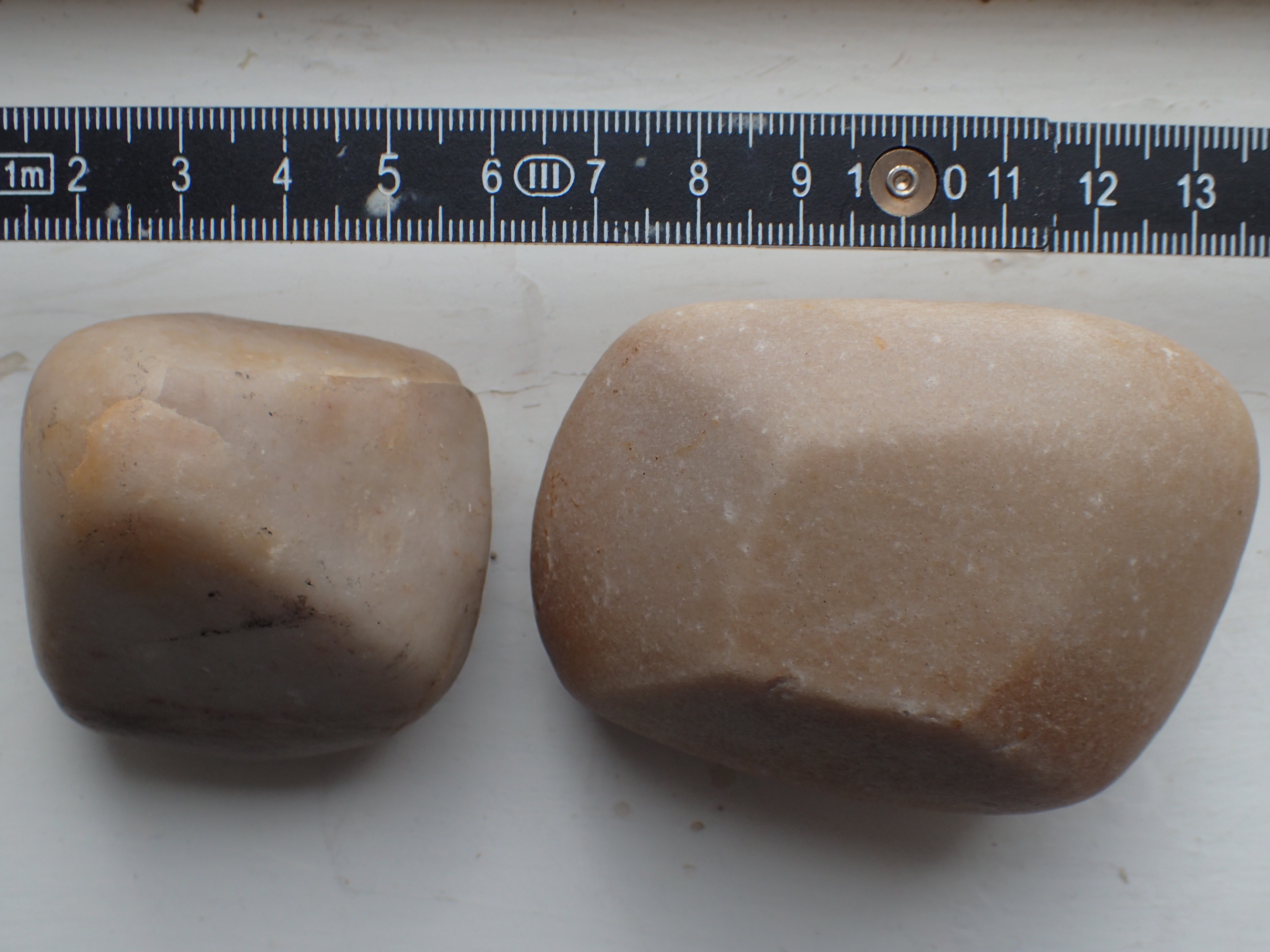 Vindslebne kvartsitter fundet i Midtjylland, Danmark